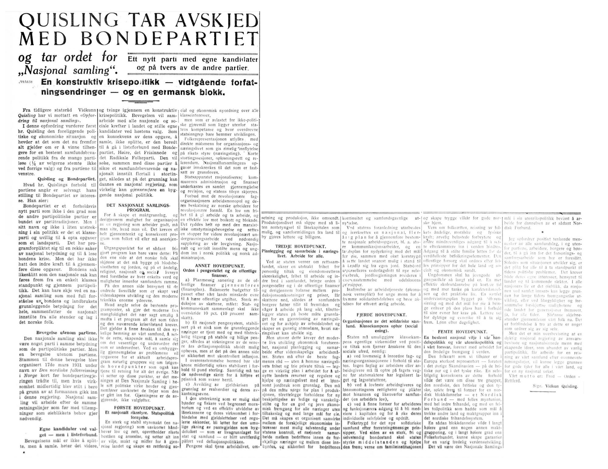 Vidkun Quislings program for Nasjonal Samling. Fra Adresseavisen, 16. mai 1933.